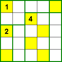 Egen teckning